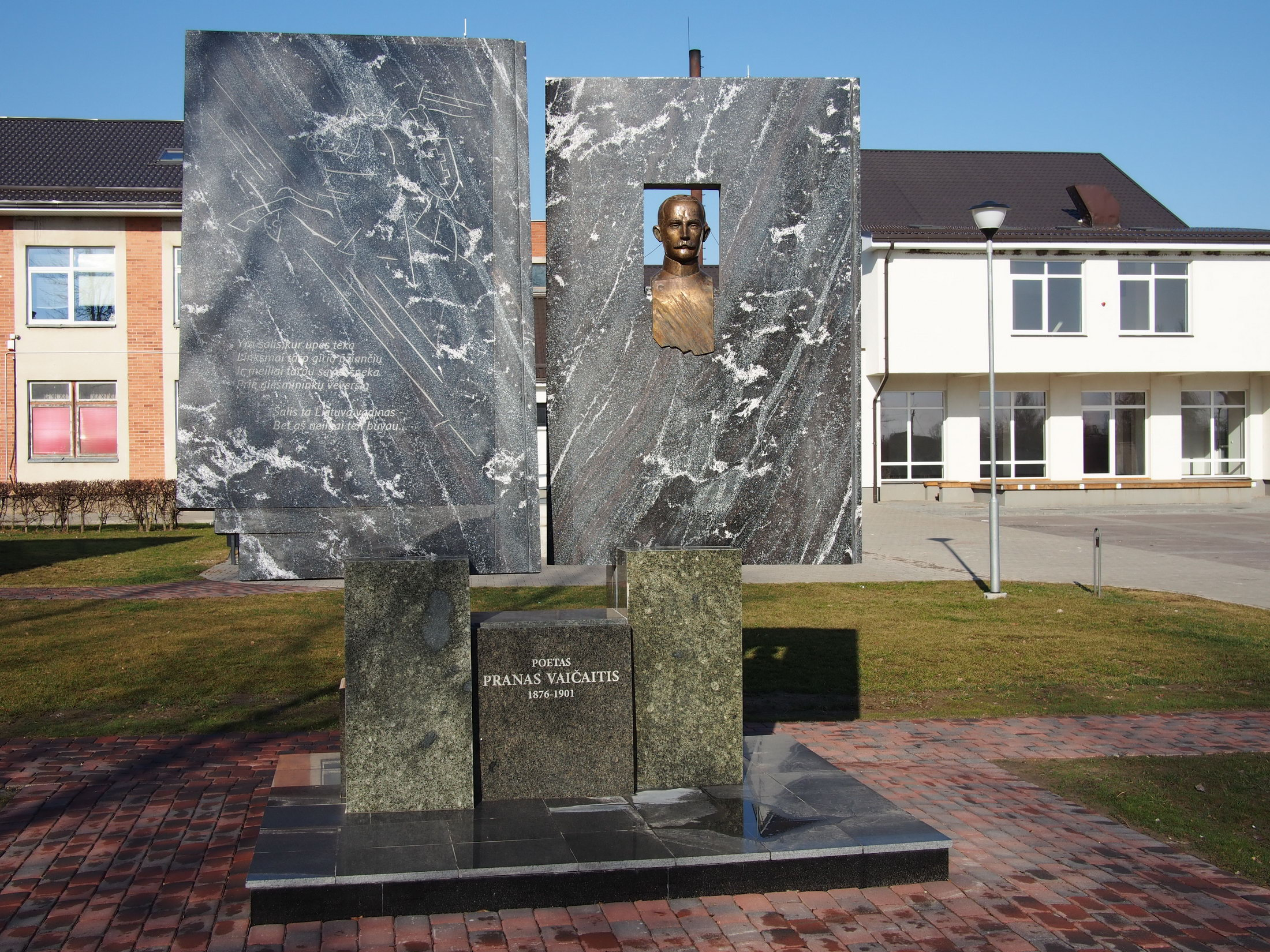 Paminklas poetui Pranui Vaičaičiui Sintautų miestelio aikštėje (skulpt. Juozas Šlivinskas), atidengtas 2013-09-21